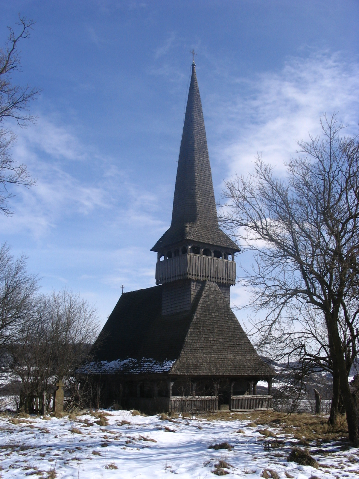 Biserica de lemn din Sânmihaiu Almaşului, judeţul Sălaj. Autor: Bogdan Ilieş Data: martie 2005 Categorie:Biserici de lemn din Sălaj (imagini)